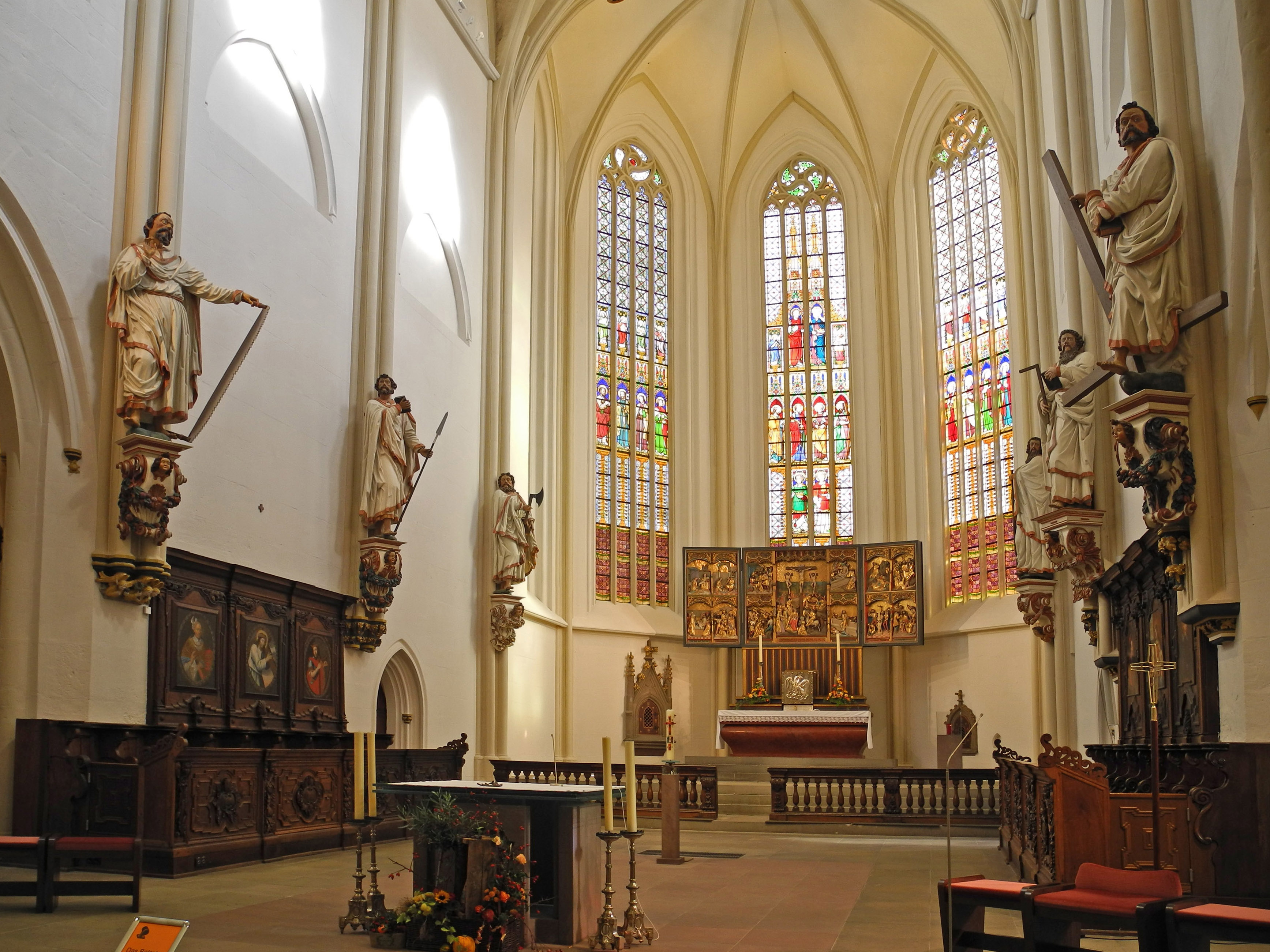 Innenraum mit Apostel-Statuen der kath. Pfarrkirche St. Cyriakus in Duderstadt (Oberkirche) in der Marktstraße